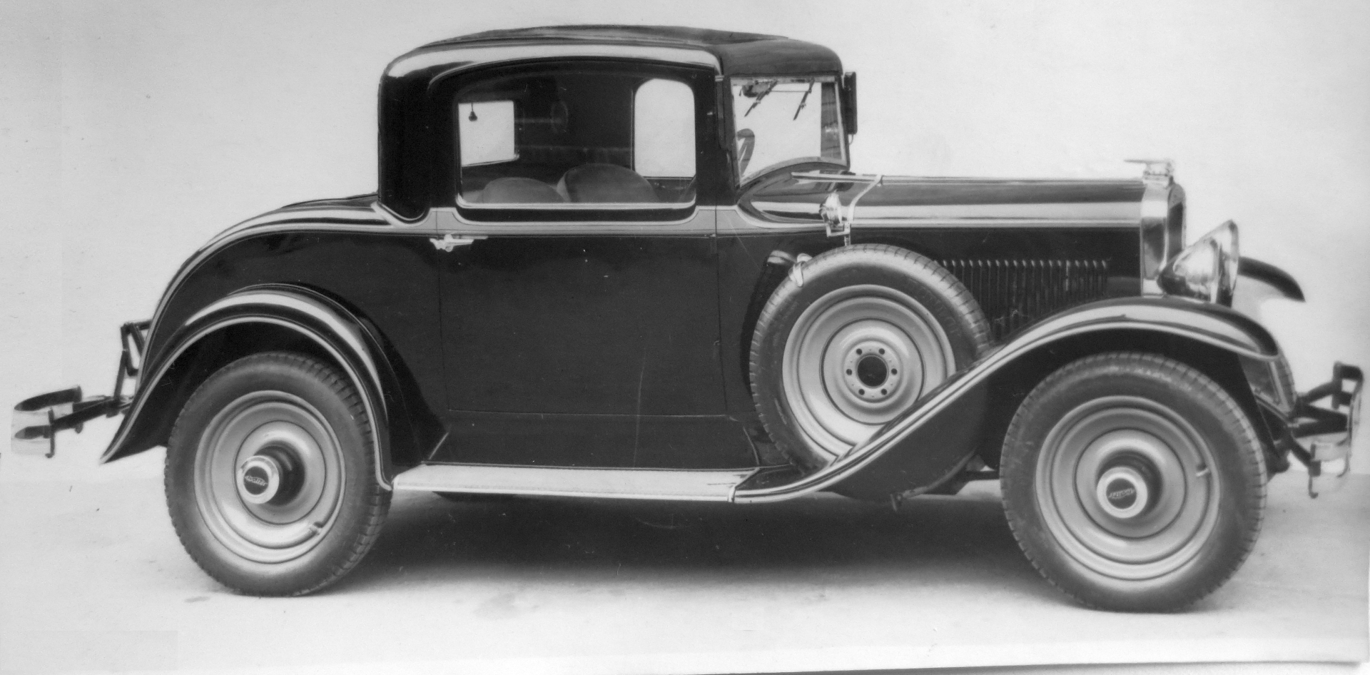 Walter Bijou (1931) dvoudvéřový